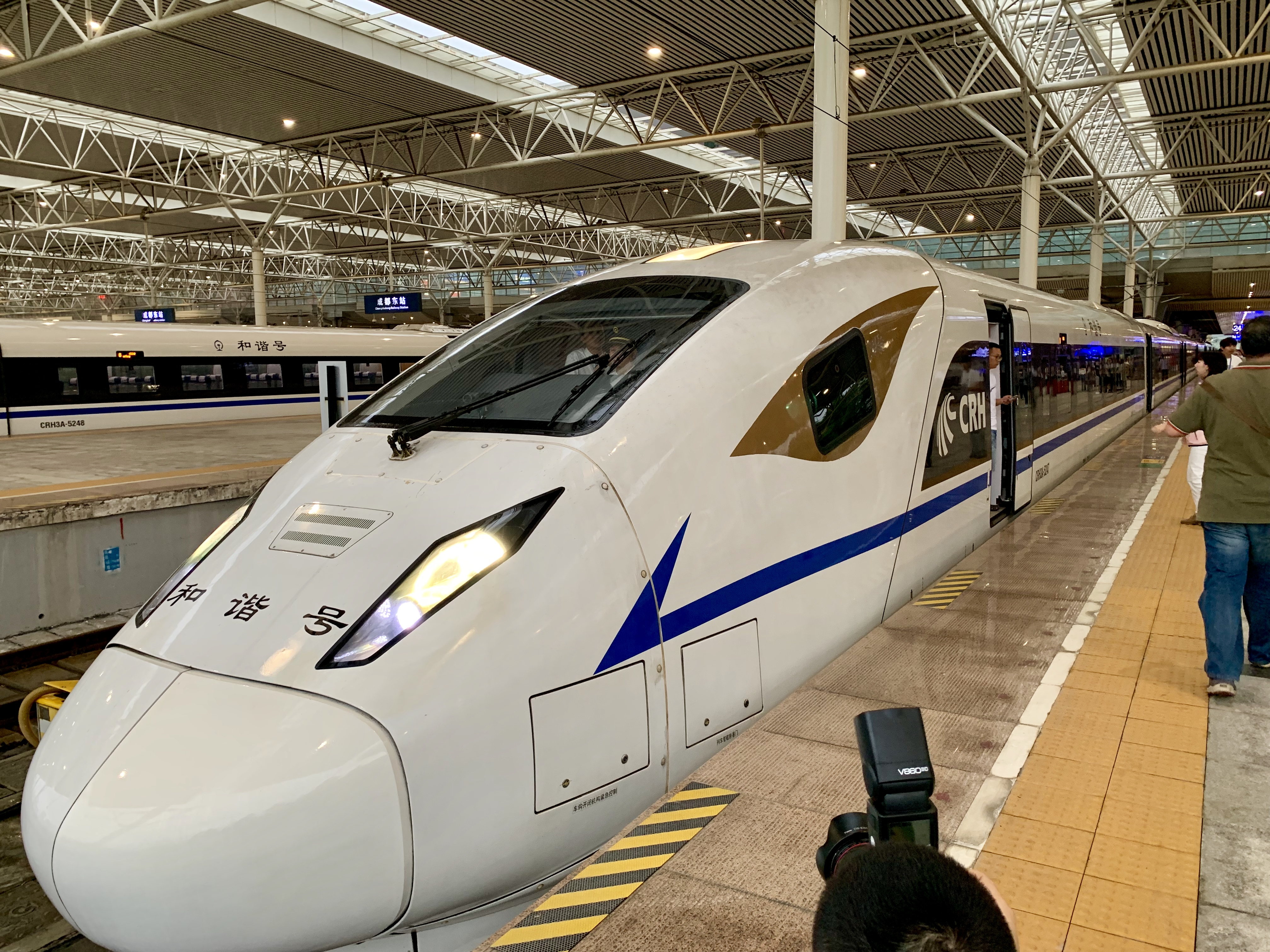 成贵客运专线成都到宜宾段首发列车